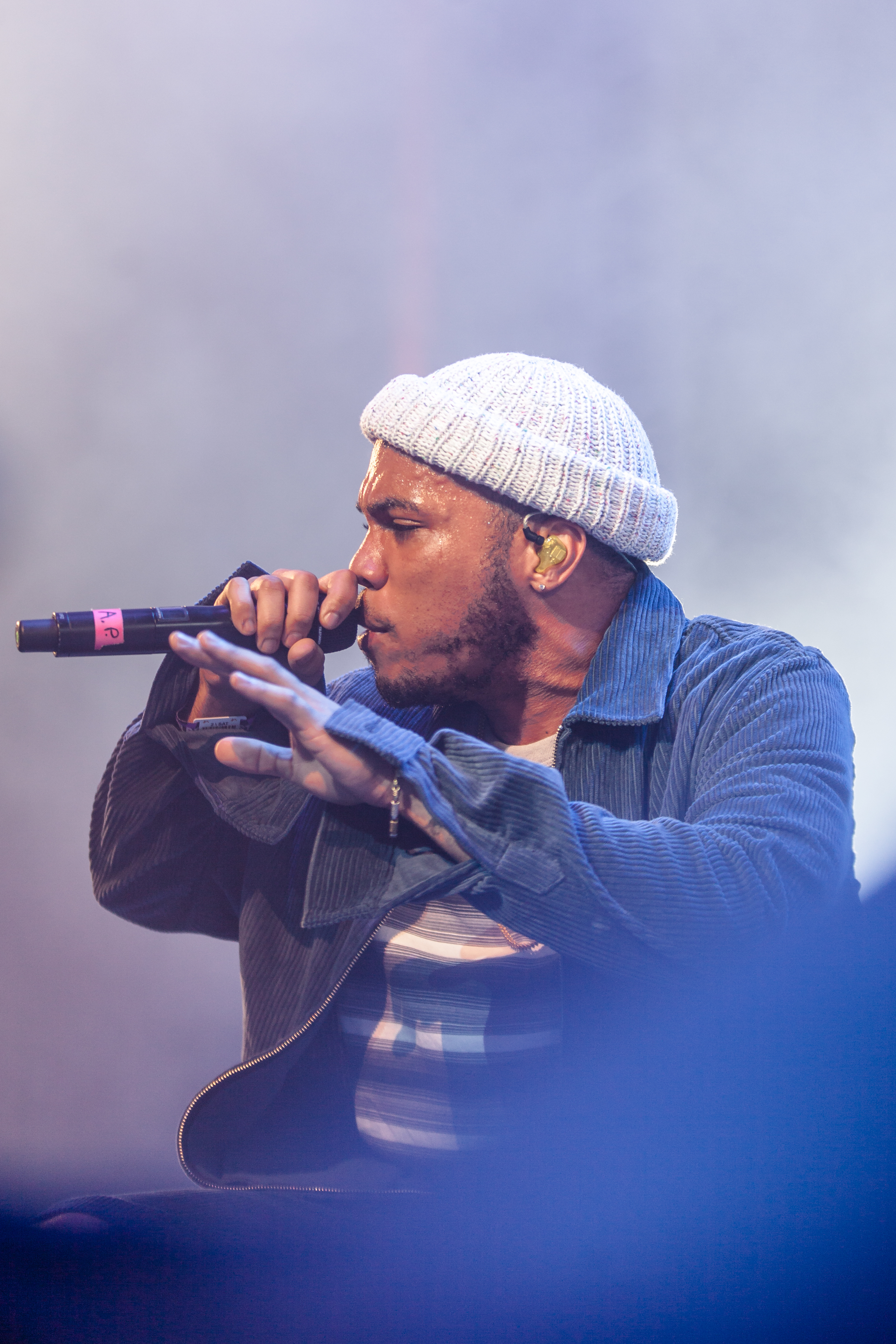 Festivalsommer This photo was created with the support of donations to Wikimedia Deutschland in the context of the CPB project "Festival Summer".